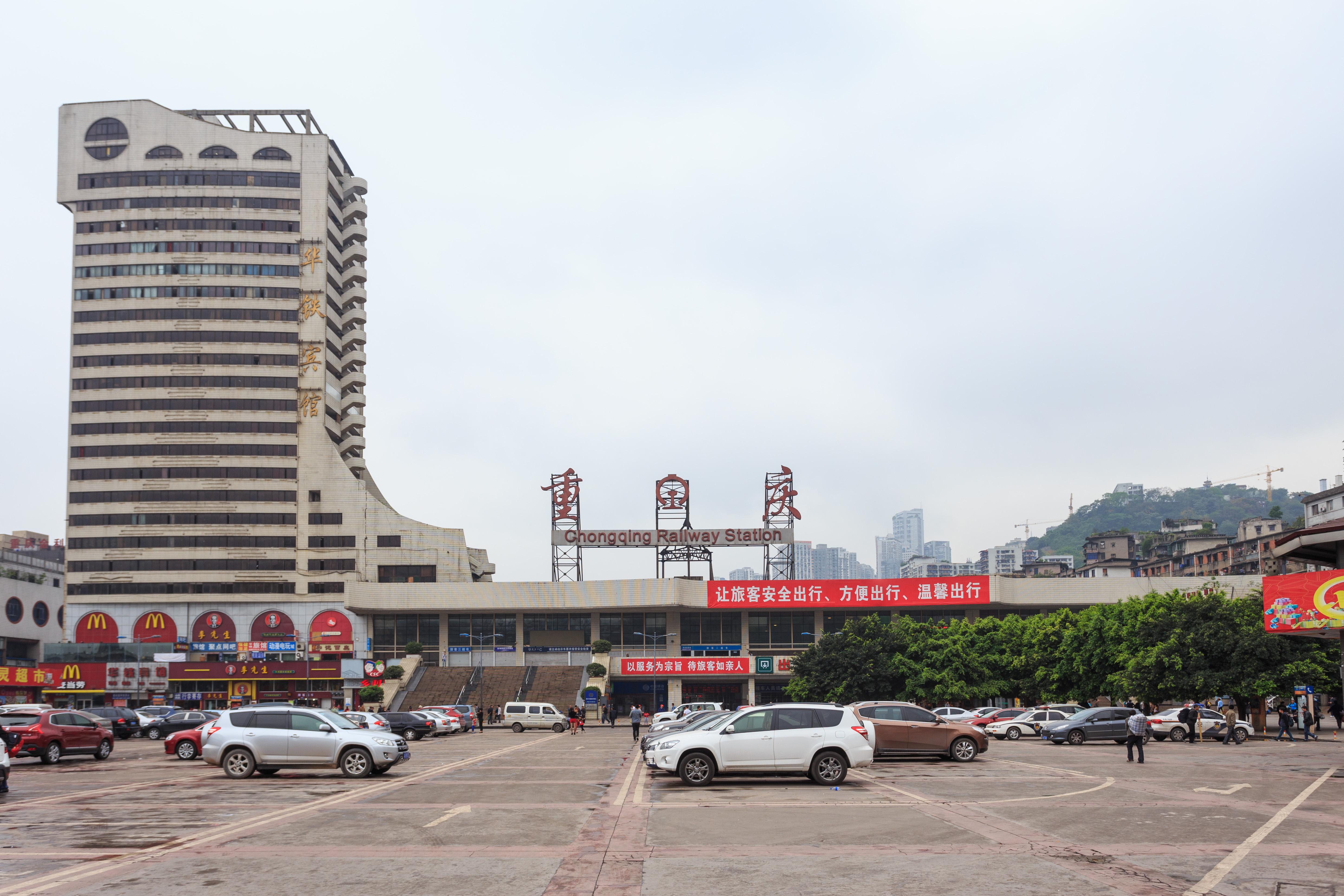 重庆站